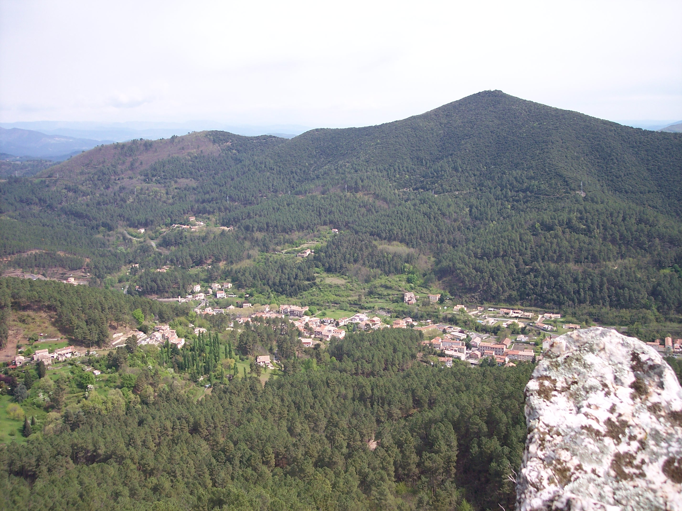 Vue générale de la commune